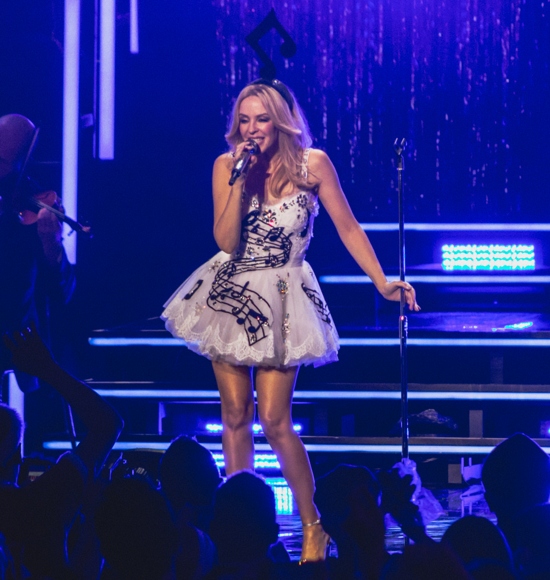 KylieRAH111215-3